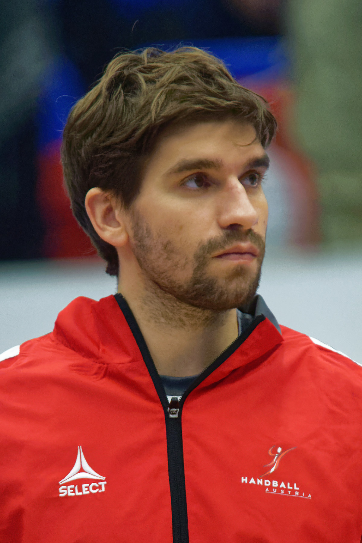 Freundschaftliches Handballspiel Österreich gegen Serbien am 28.10.2017 im BSFZ Südstadt. Foto zeigt: Tobias Schopf